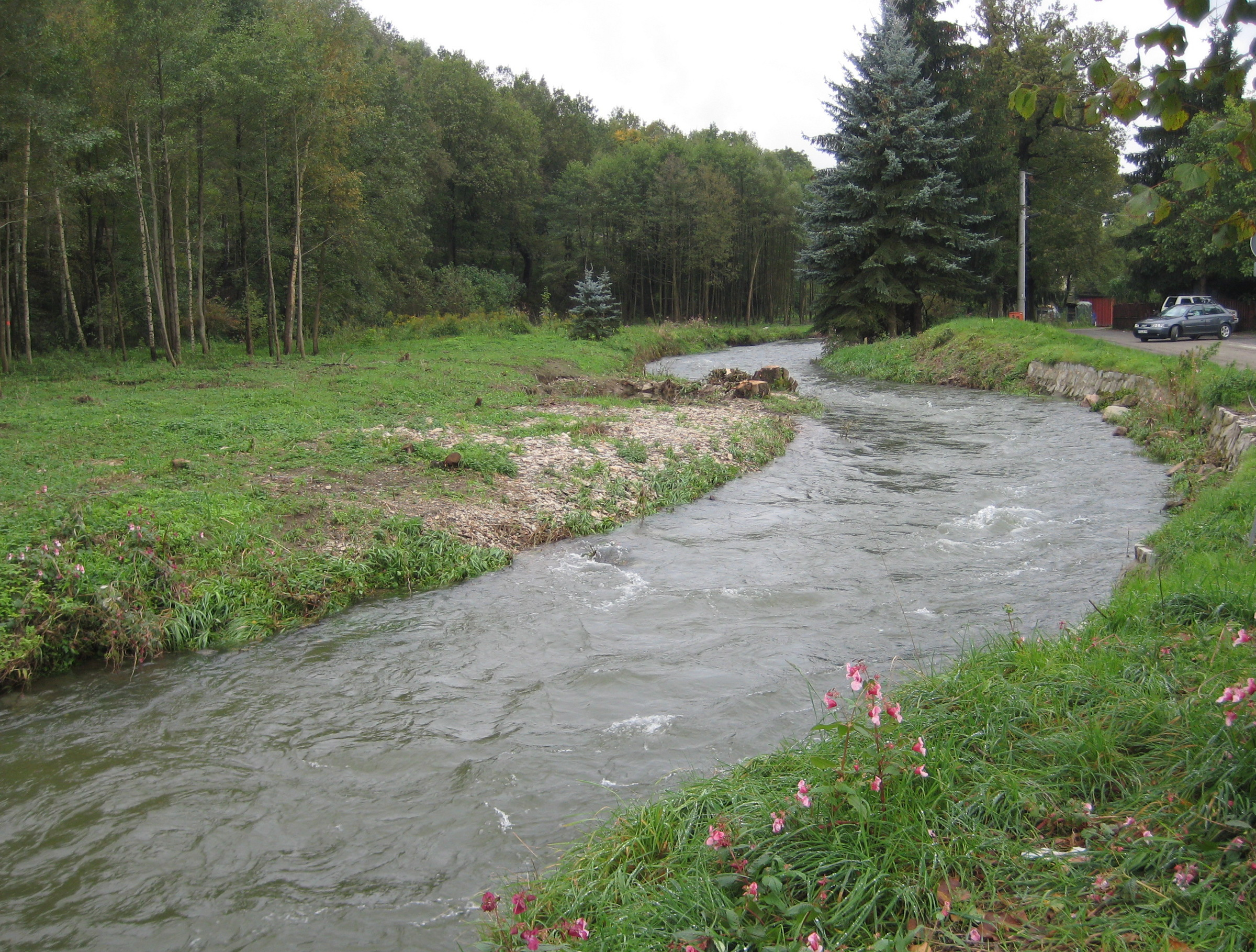 der Fluß Zwönitz nördlich von Thalheim/Erzgeb.